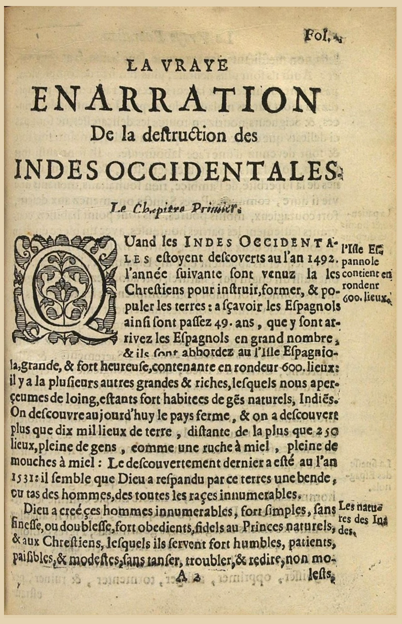 Page de titre de Bartolomé de Las Casas.- La vraye Enarration De la destruction des Indes Occidentales, Traduction en français, 1620